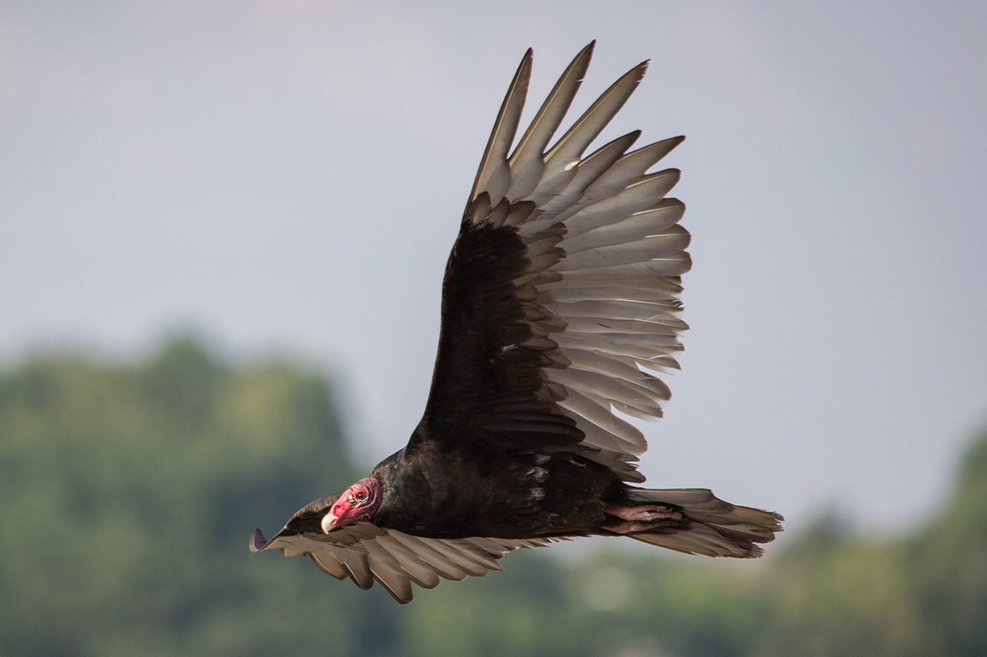 Гриф-индейка в планирующем полете